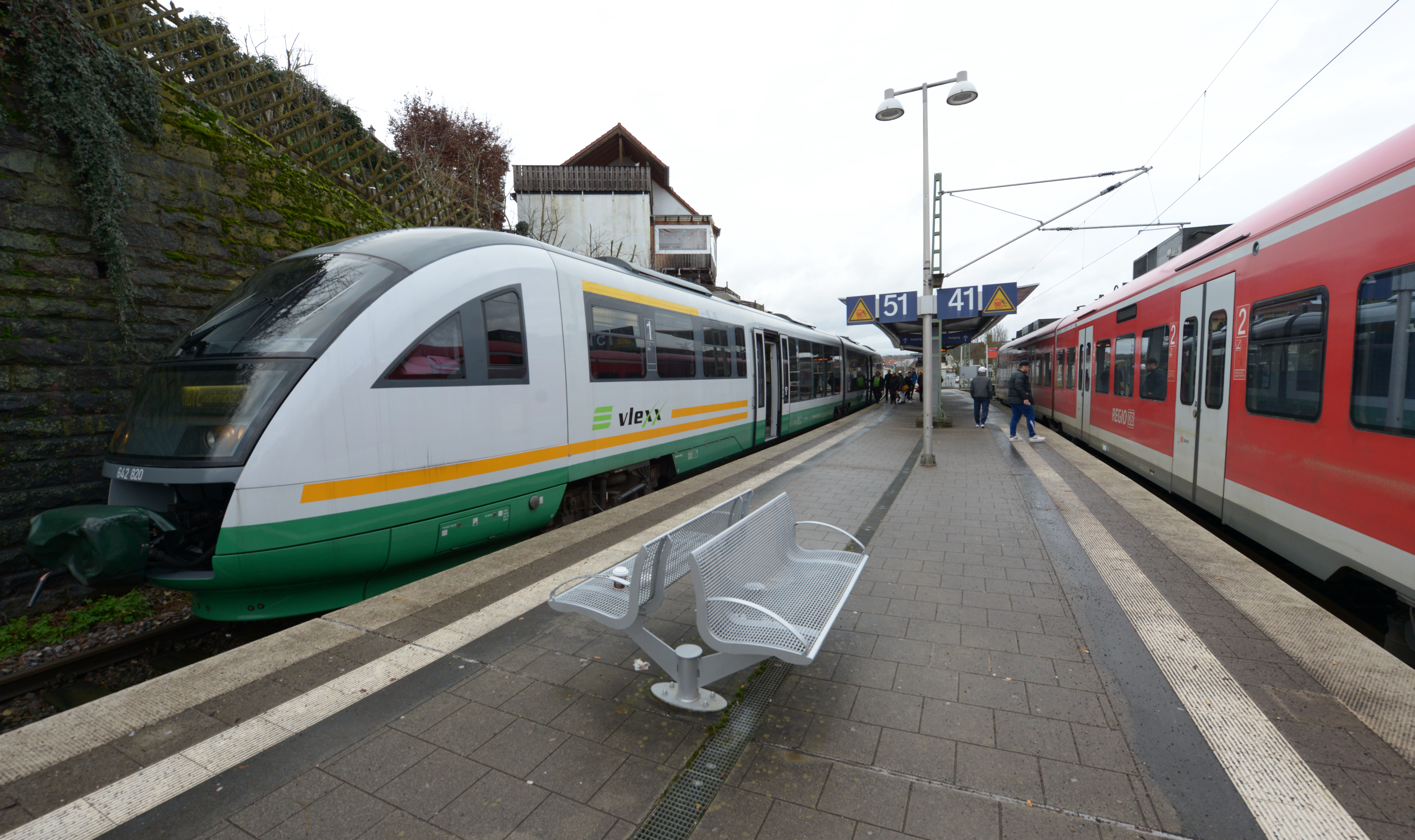 Mit dem Fahrplanwechsel am 15. Dezember 2019 übernimmt das Eisenbahnverkehrsunternehmen Vlexx von der DB Regio AG u.a. die beiden Regionalbahnstrecken Lebach-Jabach-Illingen-Saarbrücken sowie Illingen-Homburg. Aufgrund von Lieferschwierigkeiten bei den 21 bestellten Zügen kommt es in den ersten Monaten zu Ausfällen mehrerer Verbindungen. Illingen, Saarland/ Deutschland (2019).